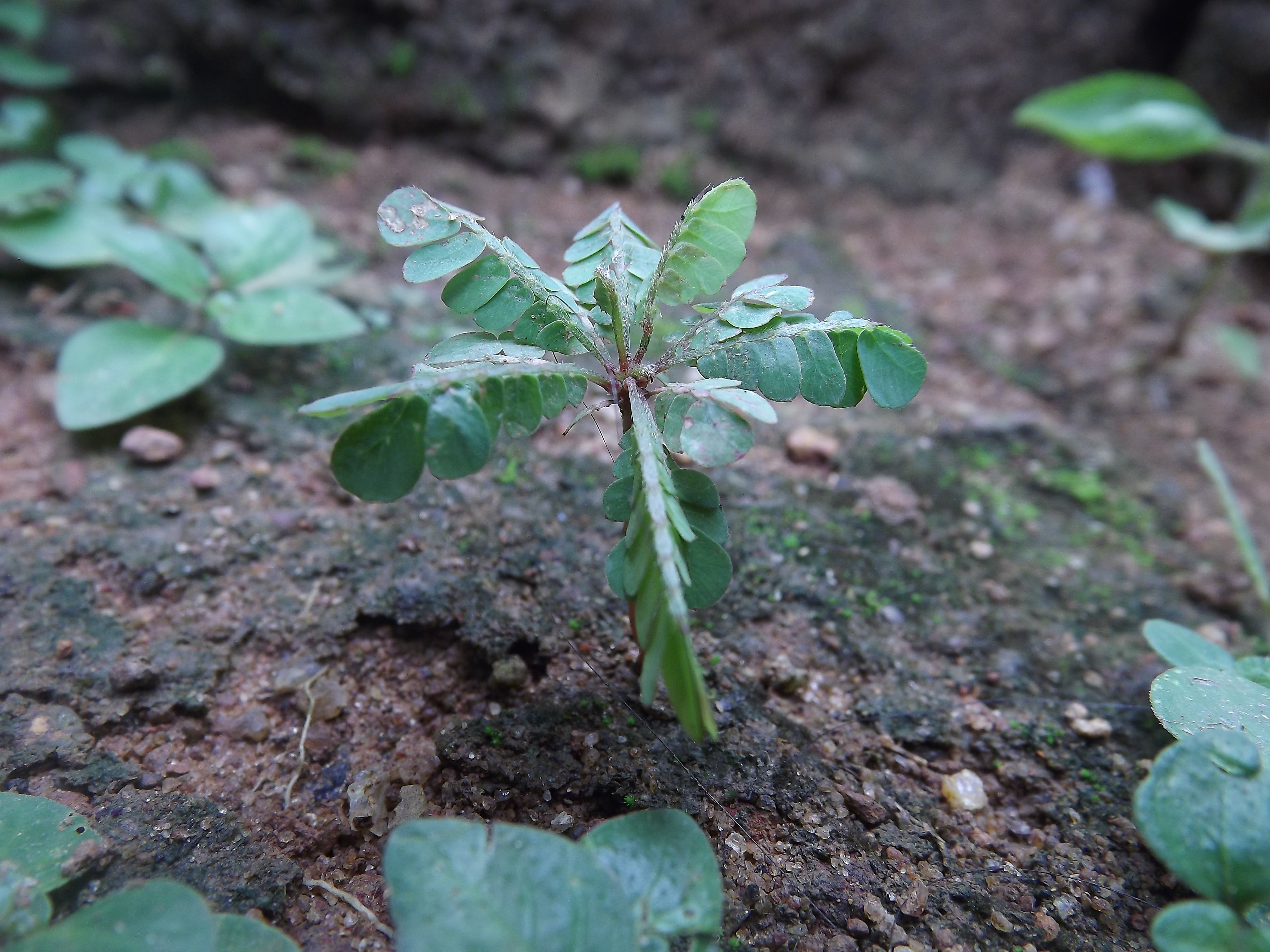 ഇന്തോ-മലേഷ്യൻ ജൈവമണ്ഡലത്തിൽ കാണപ്പെടുന്ന ഏകവർഷിയായ ചെറു സസ്യമാണ് മുക്കുറ്റി(Biophytum Candolleanum അഥവാ Biophytum Sensitivum). ആയുർവേദത്തിൽ ദശപുഷ്പങ്ങളിൽ പെടുന്ന സസ്യമാണിത്. ഓക്സാലിഡേസിയാ(Oxalidaceae) കുടുംബത്തിൽ പെടുന്ന ഈ സസ്യത്തിന്റെ ശാസ്ത്രീയ നാമത്തിന്റെ കാര്യത്തിൽ ഇന്നും തർക്കം നിലനിൽക്കുന്നു. കേരളത്തിലെ പാതയോരങ്ങളിലും പറമ്പുകളിലും തണലുള്ള പ്രദേശങ്ങളിൽ മുക്കുറ്റി കാണാവുന്നതാണ്. കവികളും സാഹിത്യകാരും മുക്കുറ്റിയെ കേരളീയ ഗ്രാമീണതയുടെ ബിംബമായി കണക്കാക്കാറുണ്ട്.